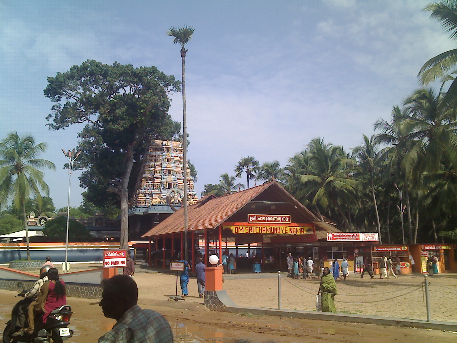 കരിക്കകം ക്ഷേത്രത്തിന്റെ ദൃശ്യം മൊബൈലിൽ പകർത്തിയത്.